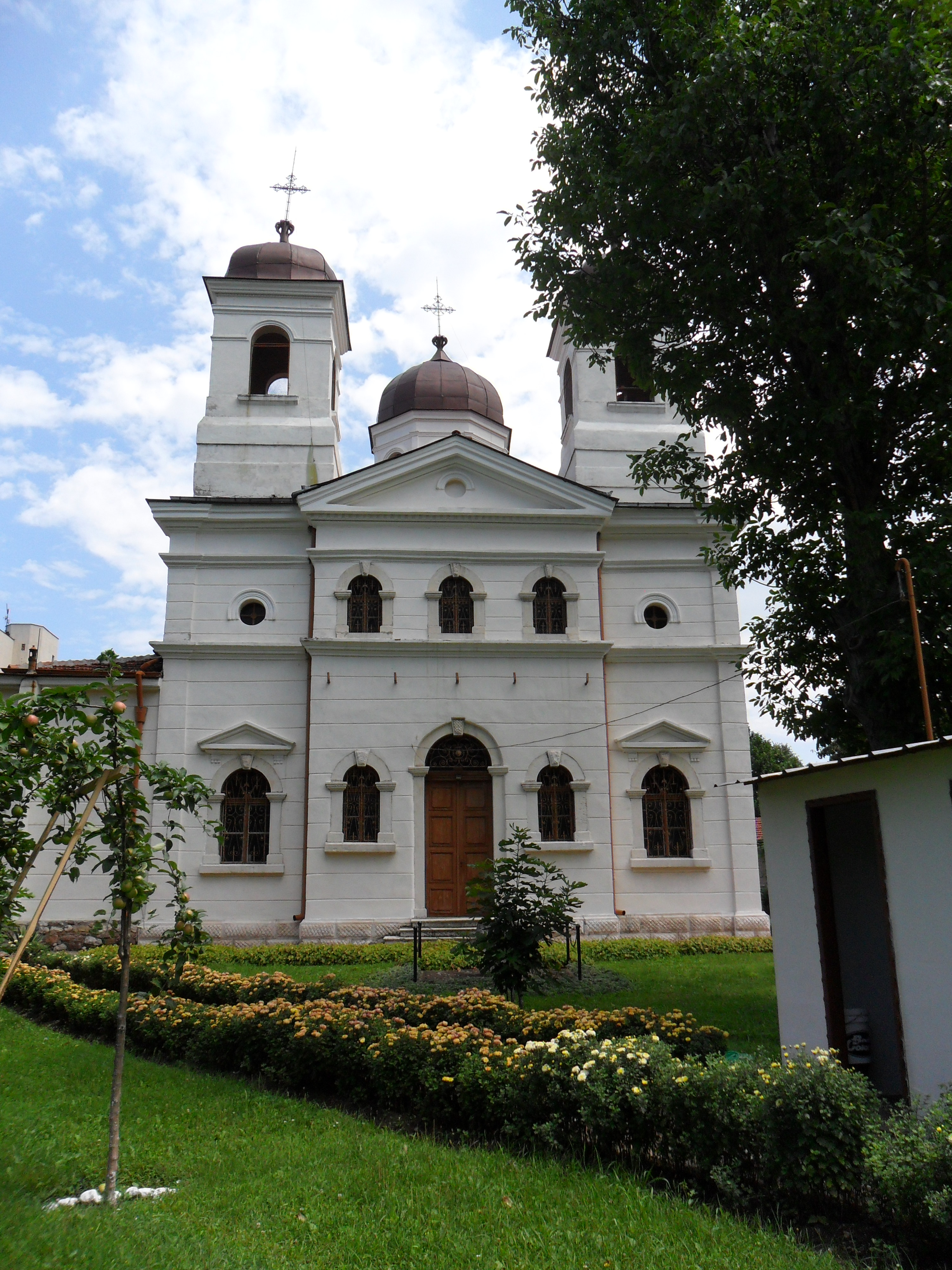 Храм " Св.Св. Константин и Елена " ( Св.Царей ) - Враца